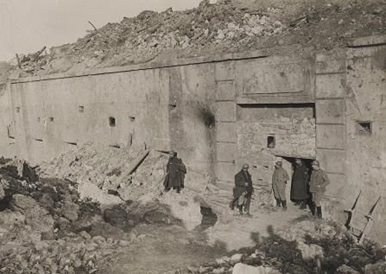 Entrée central de la Fort de Vacherauville